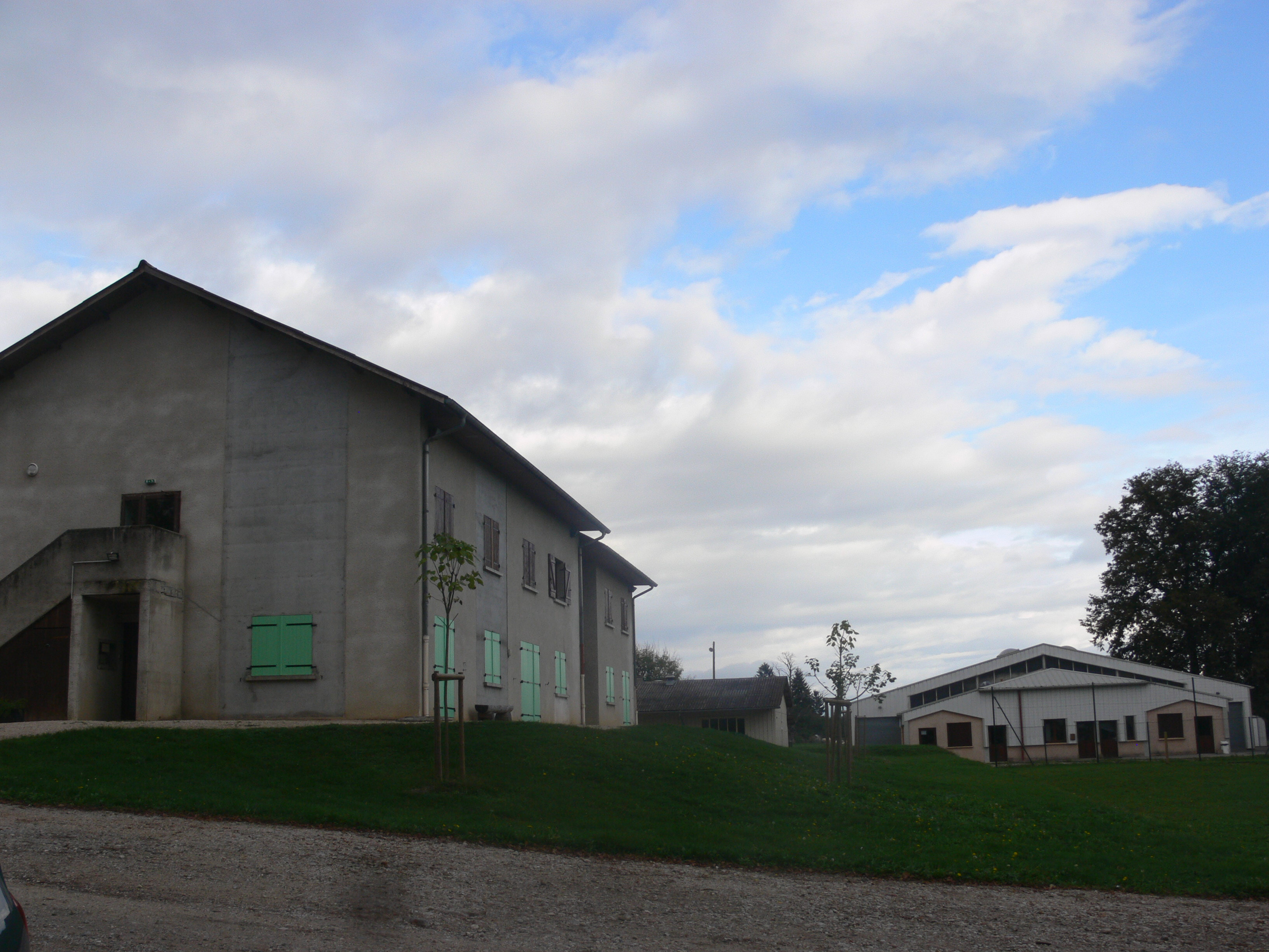 Saint-André-le-Gaz - MFR Le Chalet